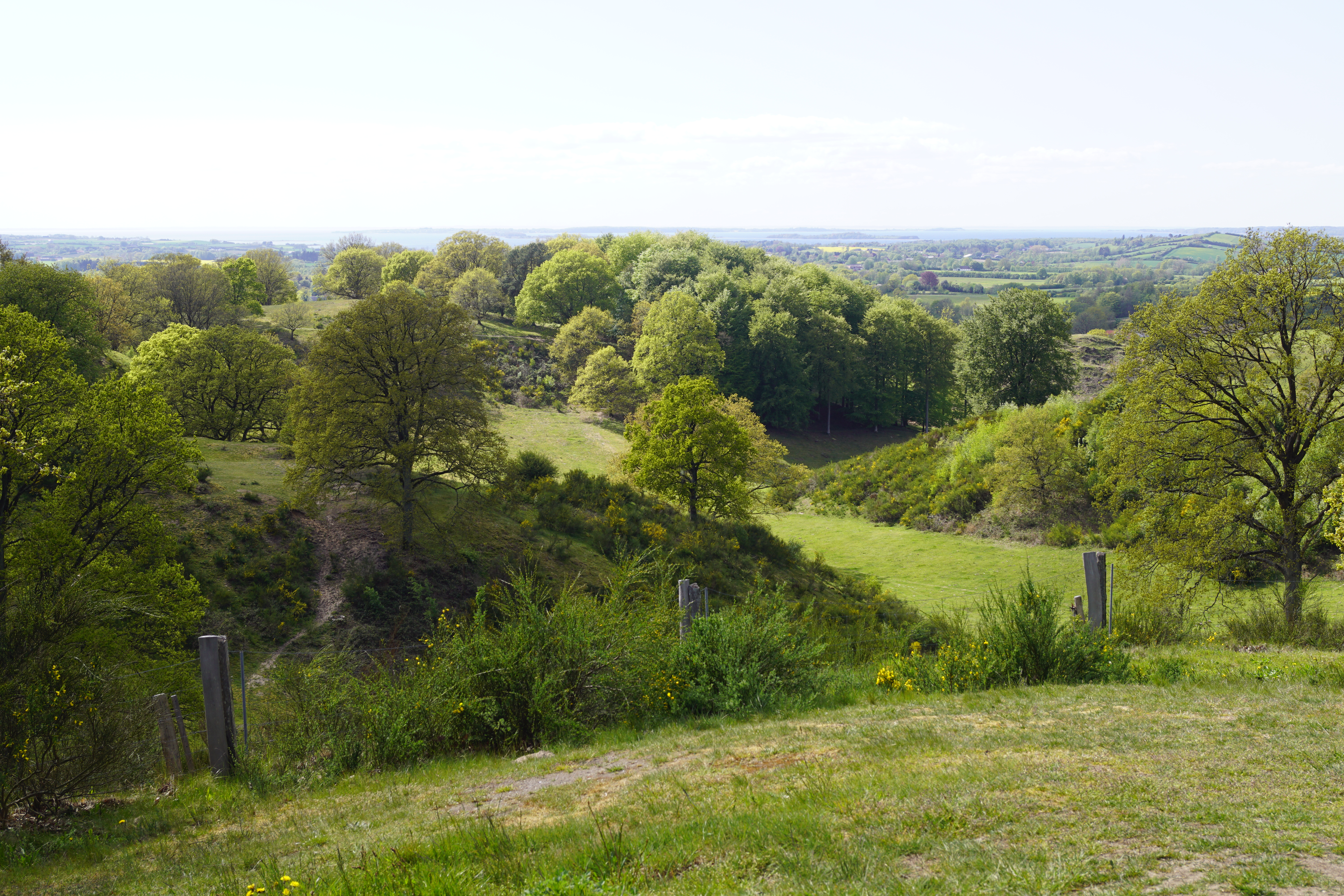 Udsigt i Svanninge Bakker